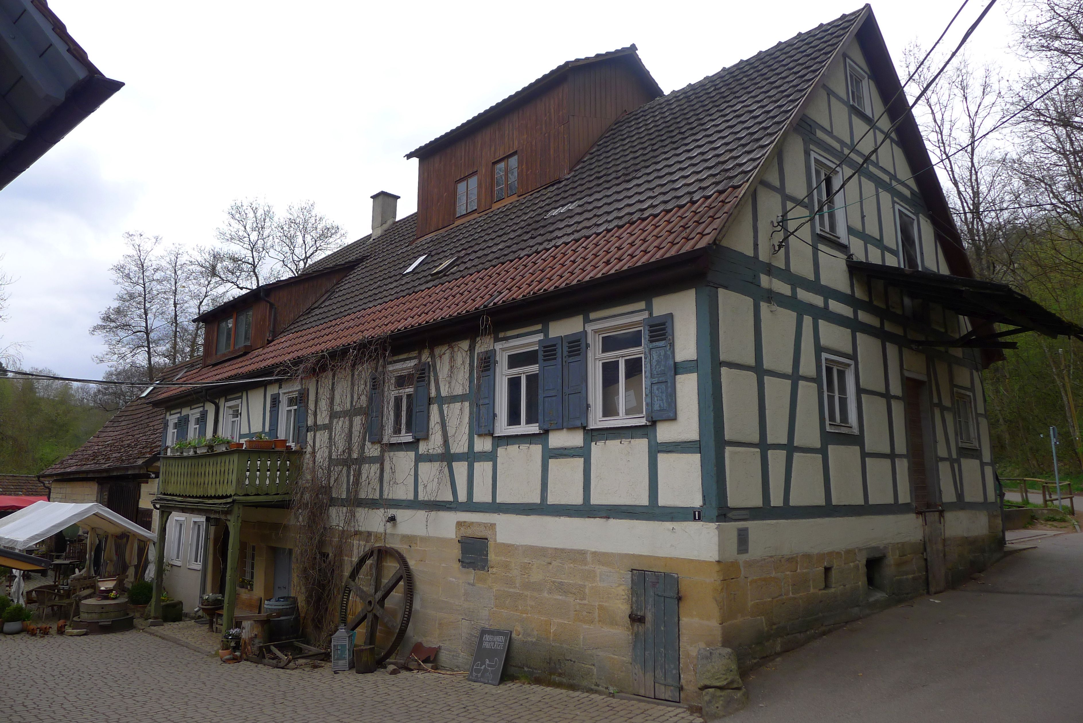 De Eselsmühle vanaf de Johann Daniel Kettnerweg